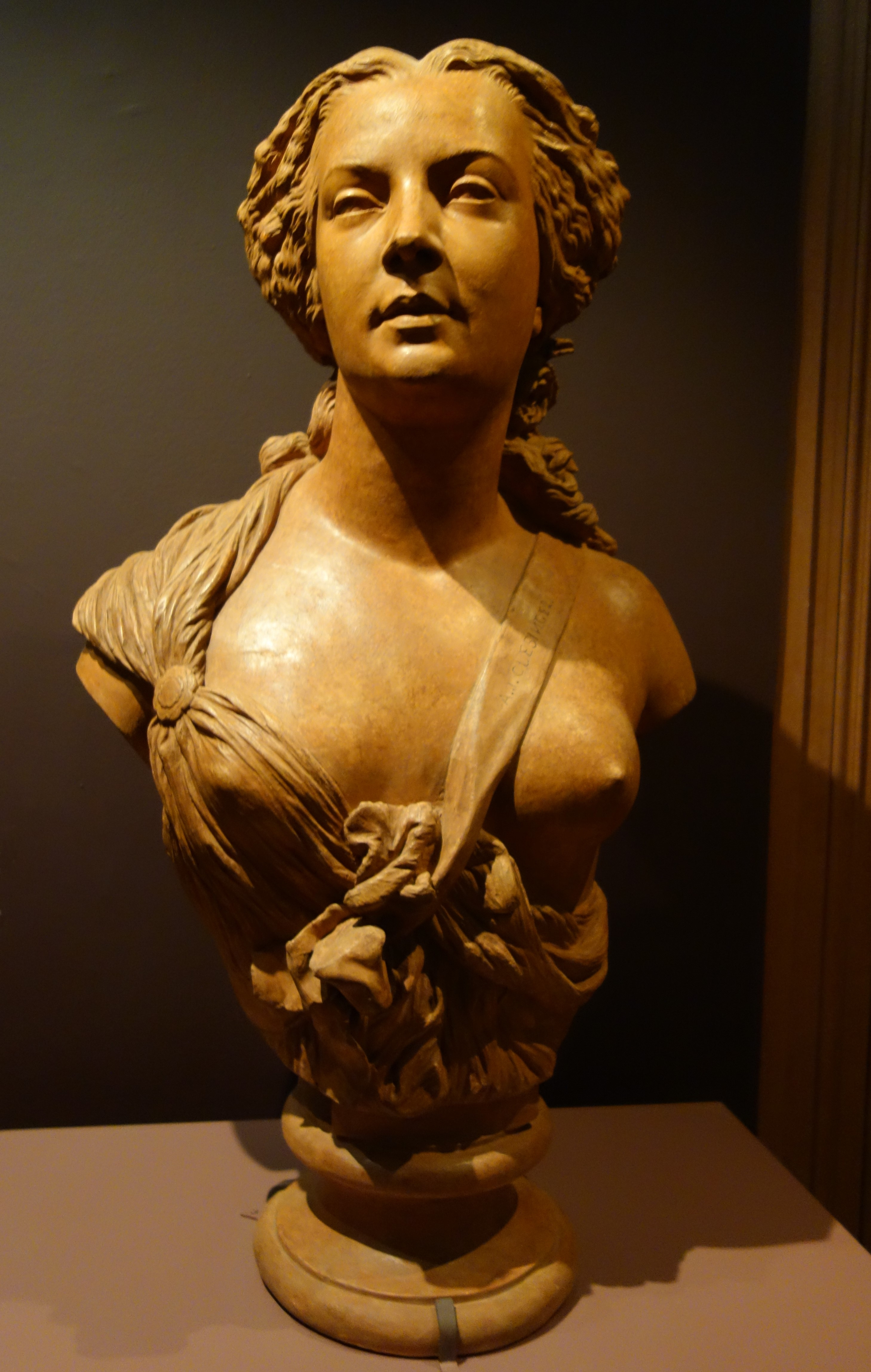 Attribué à Auguste Clésinger, Buste présumé de Madame Sabatier (inspiratrice de Charles Baudelaire), 1847, terre cuite, localisation inconnue.